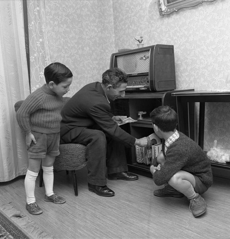 Italienische Gastarbeiter-Kinder in Walsum In der Schule und zuhause